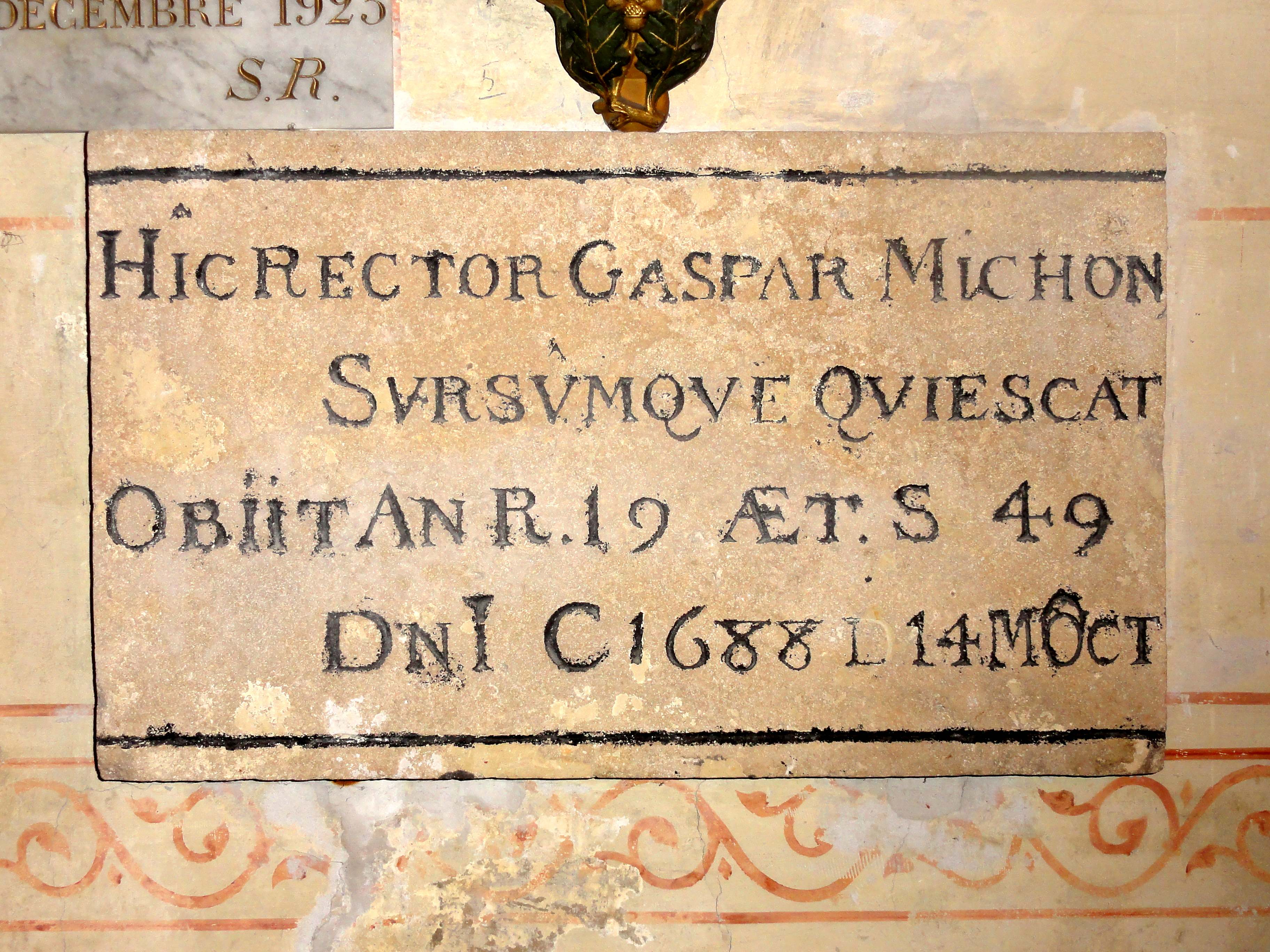 Mobilier de l'église (voir titre).